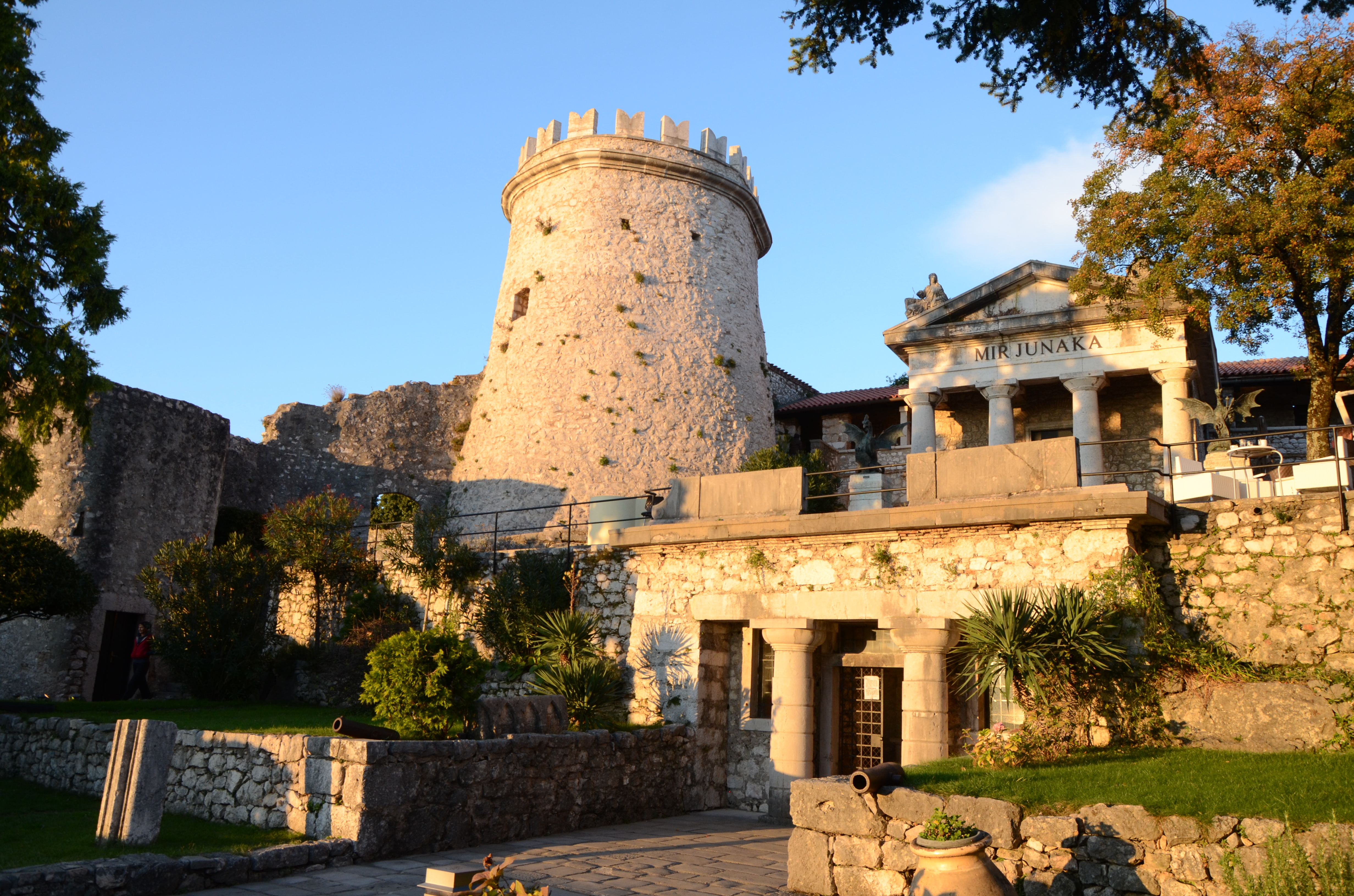 Rijeka, Croatia